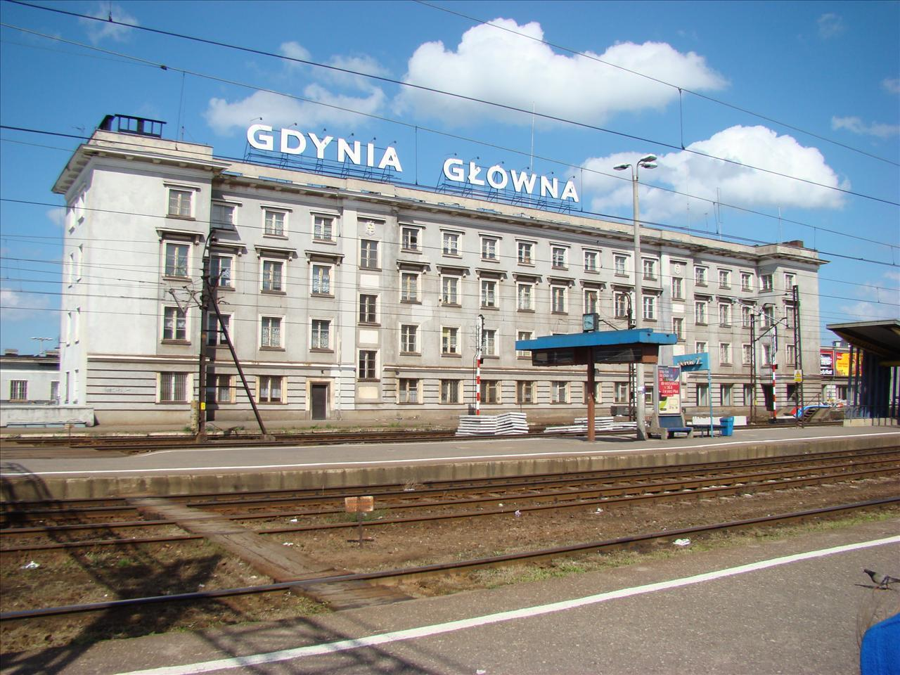 Widok na budynek dworca Gdynia Główna